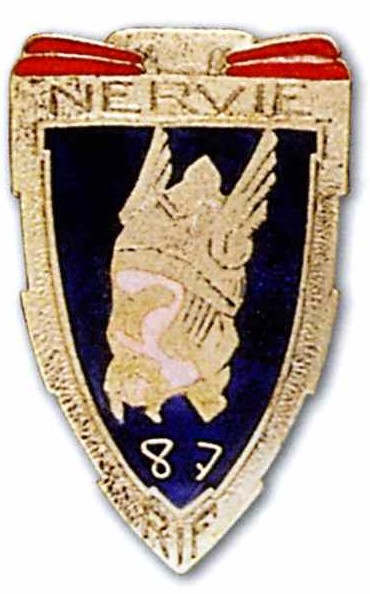 insigne régimentaire du 87e Régiment d'Infanterie de Forteresse (87 eRIF).